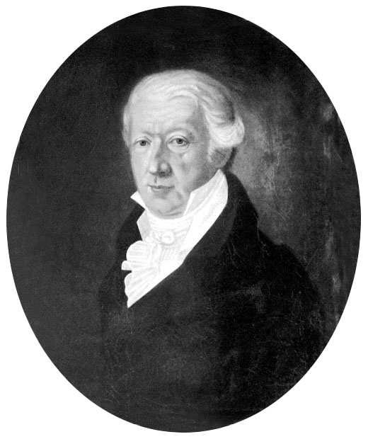 Franz Wilhelm von Spiegel (zeitgenössische Darstellung)